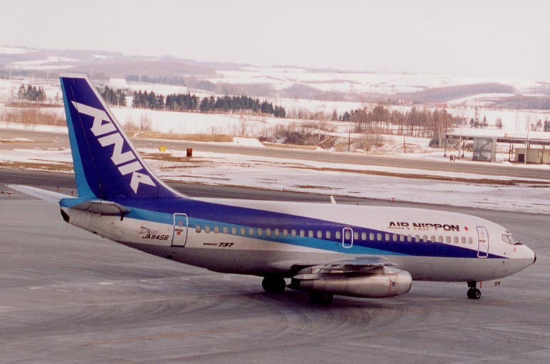 女満別空港を出発する、エアーニッポンのボーイング737(JA8456 B737-281adv. S/N:21770/588)